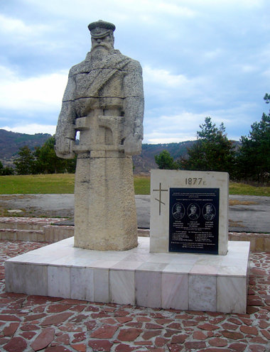 Паметник на прапорщиците от Лейбгвардейски драгунски полк Михаил Данилевский, Дмитрий Назимов и Николай Велинский както и на 10 нисши чина убити на 11/23 ноември 1877 г. край село Новачене за Освобождението на България